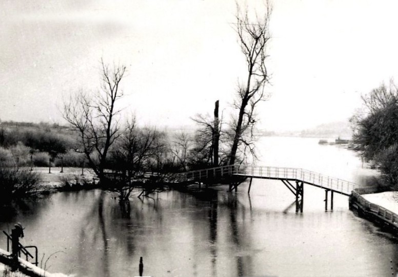 Haderslev ca 1927, utsikt över Sönderbron